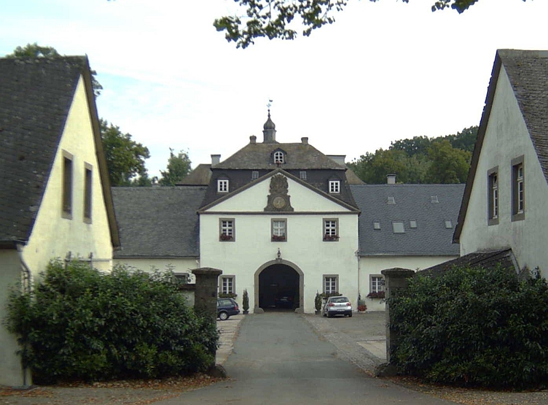 Schloss Laer Einfahrt Meschede, Germany.